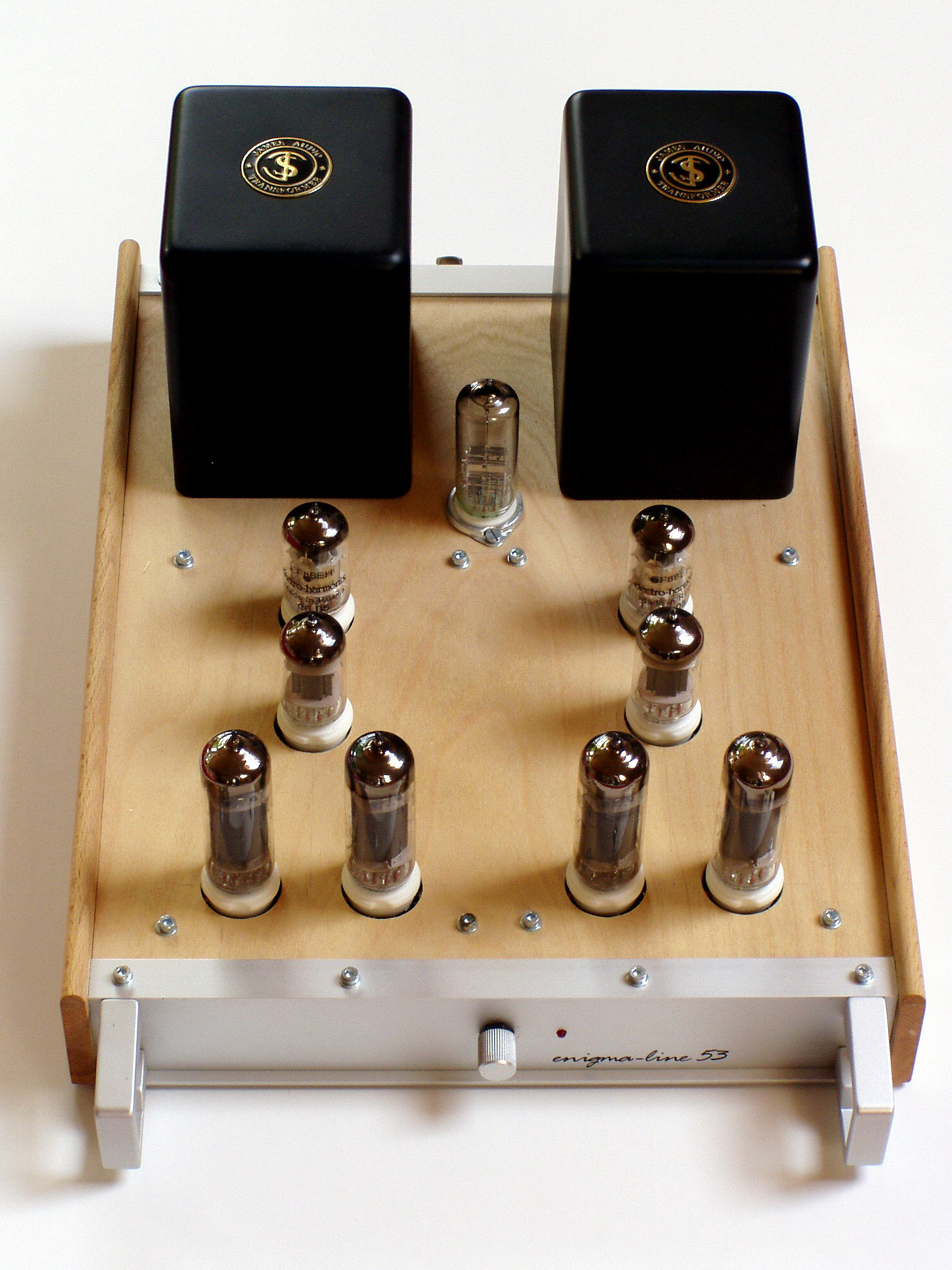 moderner Nachbau eines Mullard 5-10 (ohne das externe Netzteil) / Réplique moderne d'un Mullard 5-10 (sans l'alimentation externe).